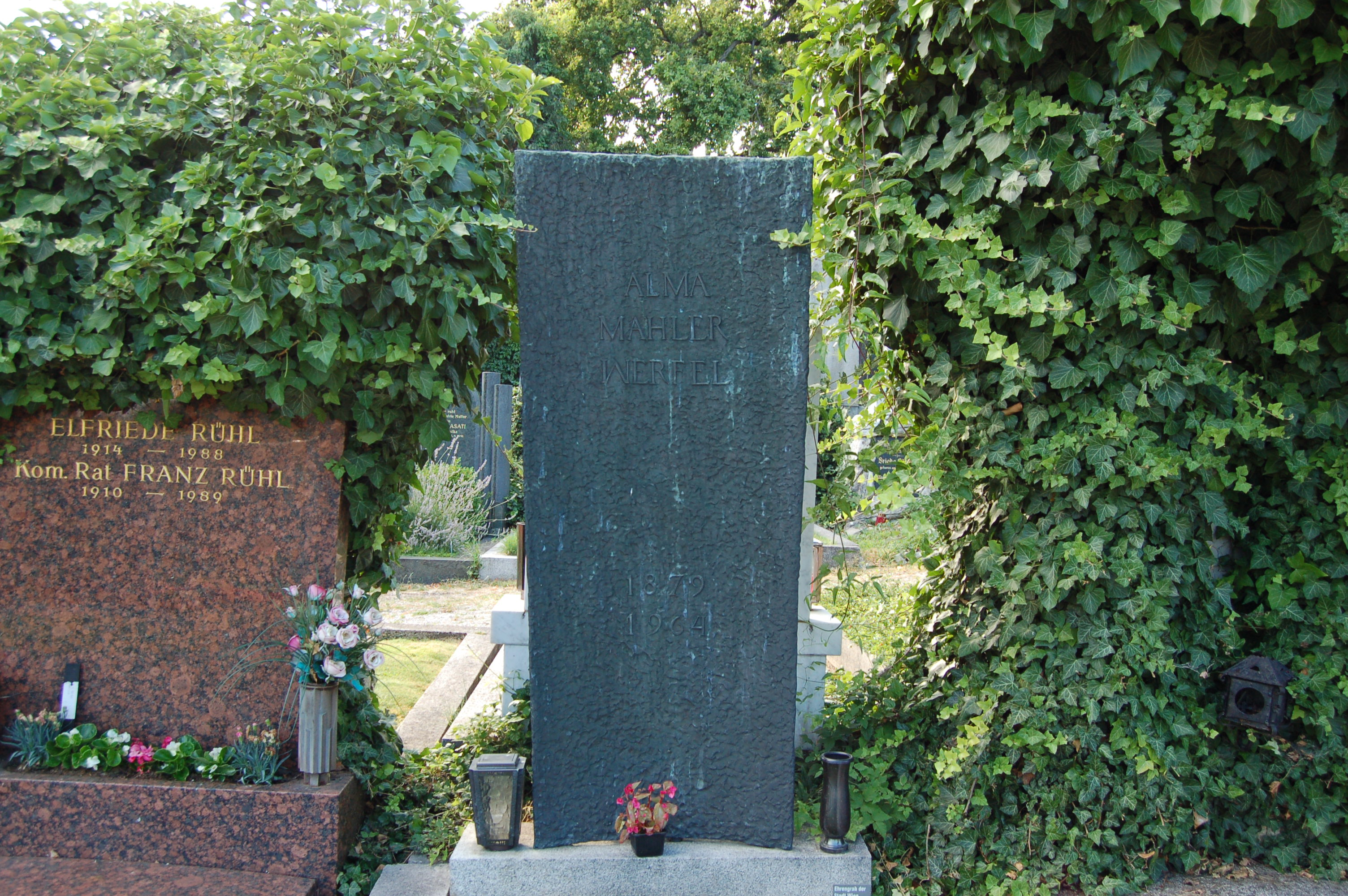 Grinzinger Friedhof, Grabmal von Alma Mahler-Werfel